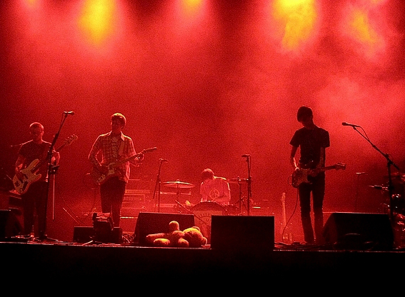 For A Minor Reflection en 1ère partie de Sigur Rós, au Zénith de Paris (15 Novembre 2008).